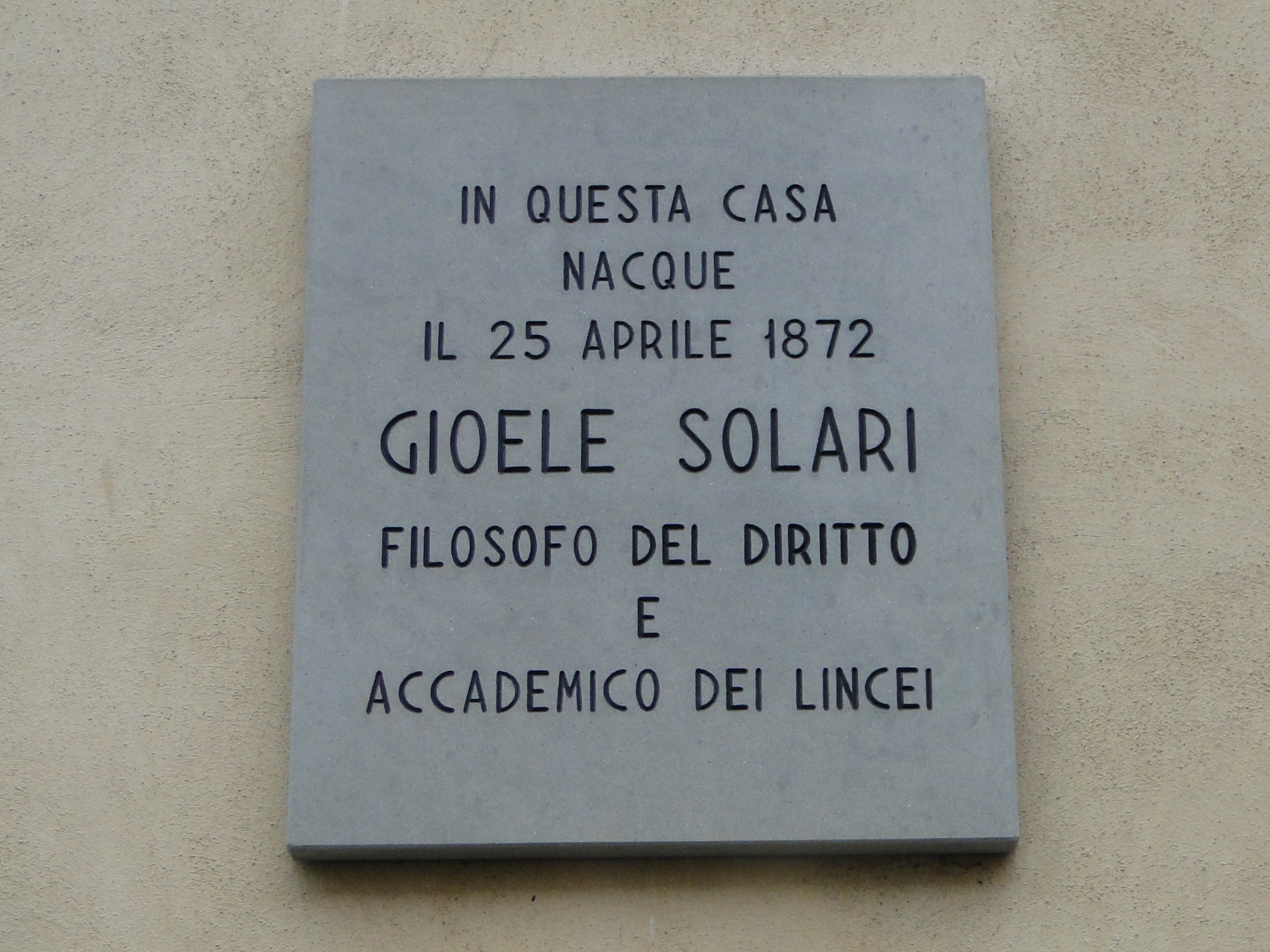 Albino (BG), targa Gioele Solari, via Carrara